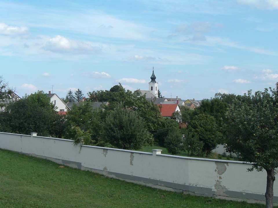 Dudar, Hungary